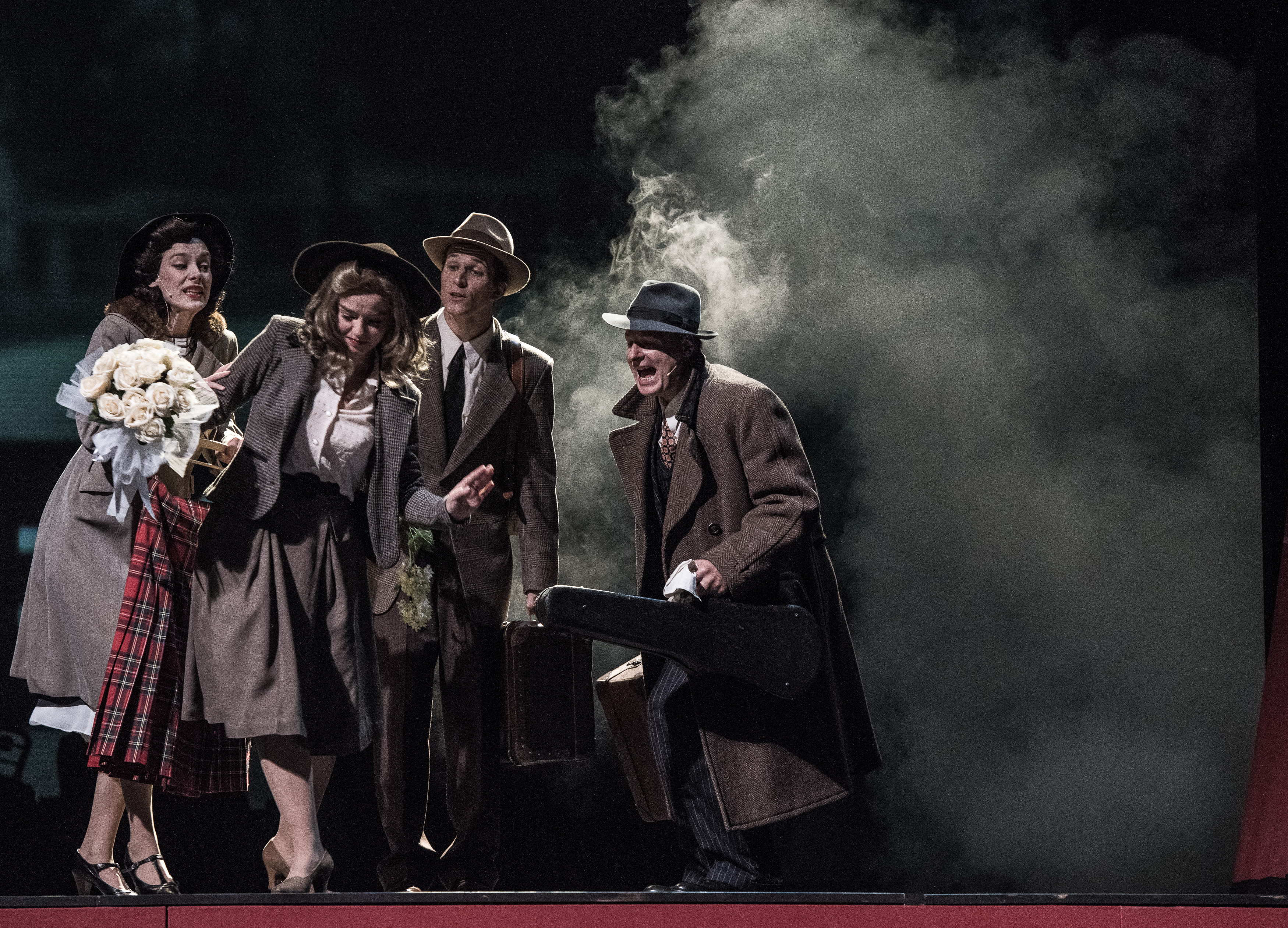 Záběr z inscenace „V rytmu swingu buší srdce mé“ (Národní divadlo, režie Ondřej Havelka, premiéra 2015). Zleva: Jana Pidrmanová („Zdenka“), Pavla Beretová („Zuzana Tylová“), Igor Orozovič („Jiří Traxler“) a Martin Zbrožek j. h. („Karel Slavík“).